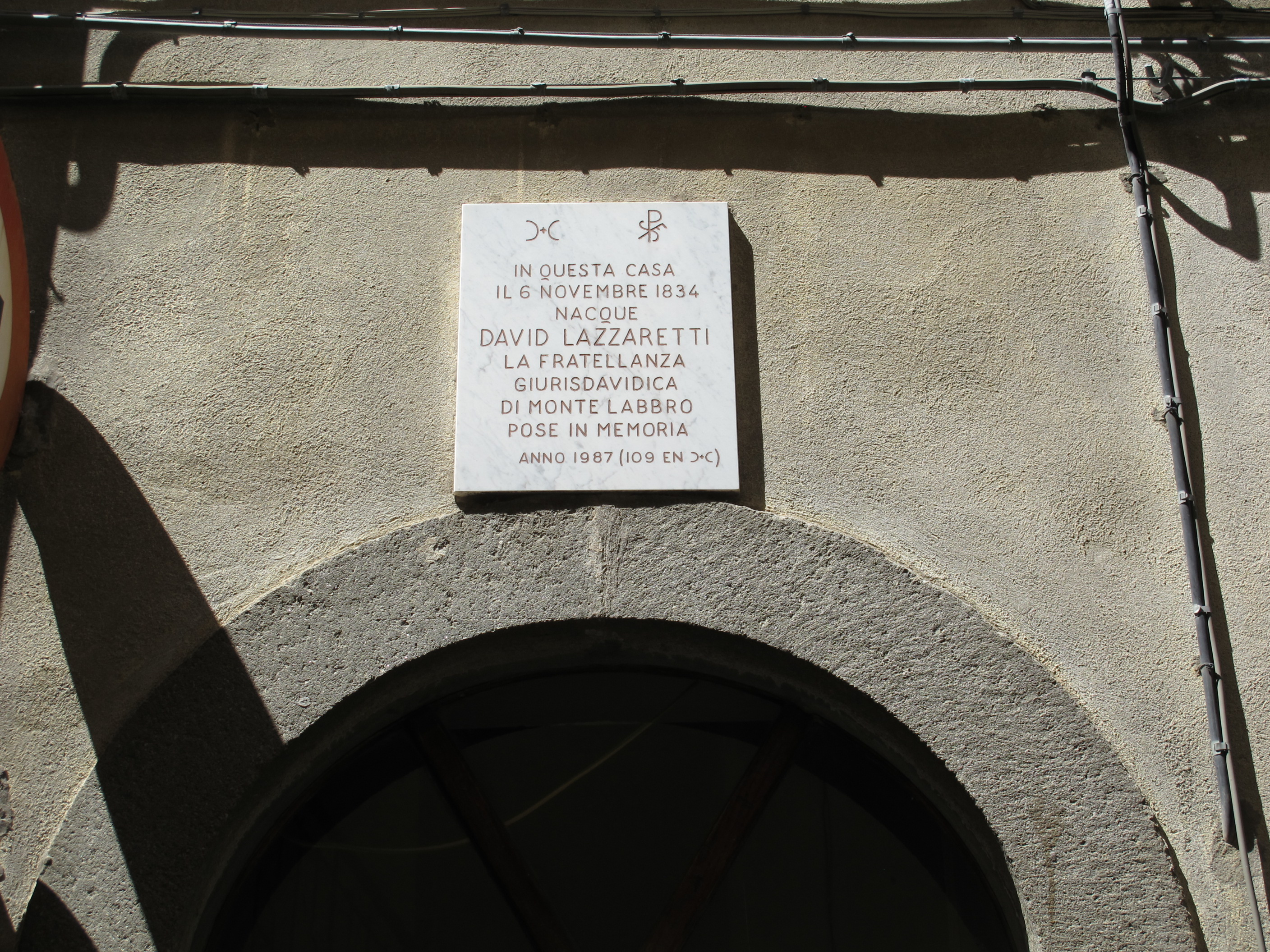 Arcidosso, targa david lazzaretti